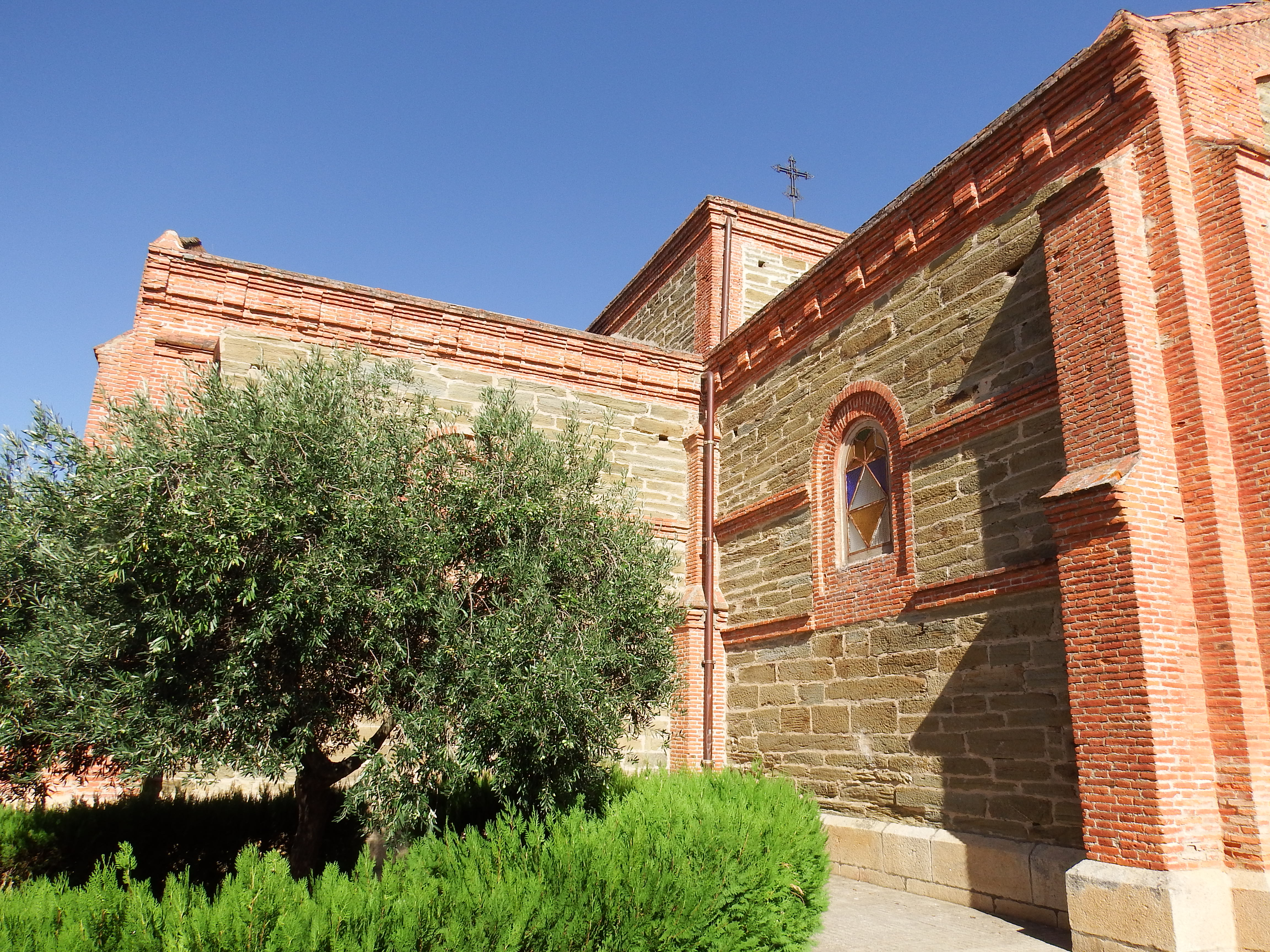 Cedillo